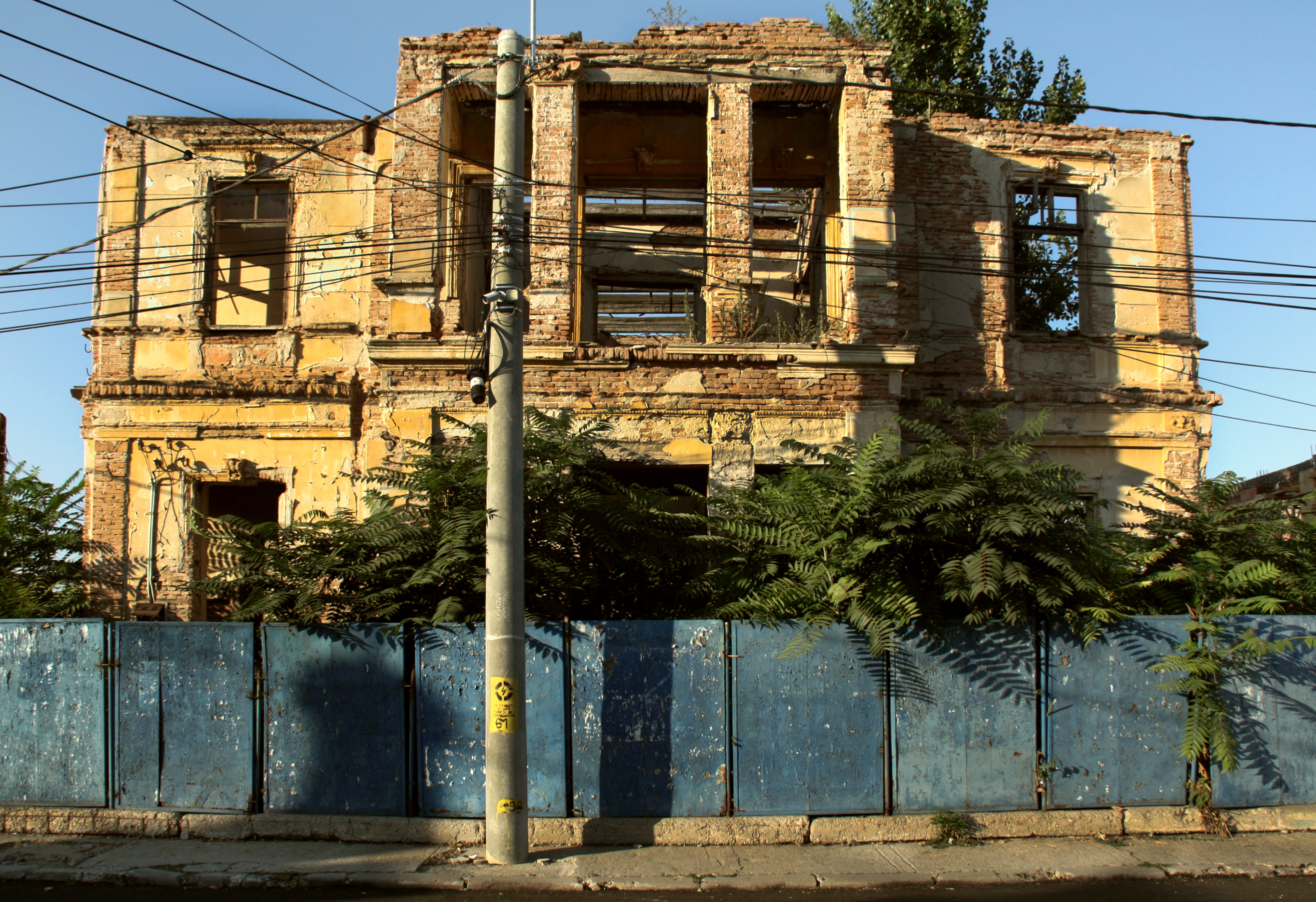 Poșta veche, str. București 193, municipiul Călărași, România.